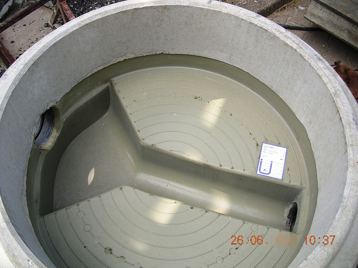 Fettabscheider